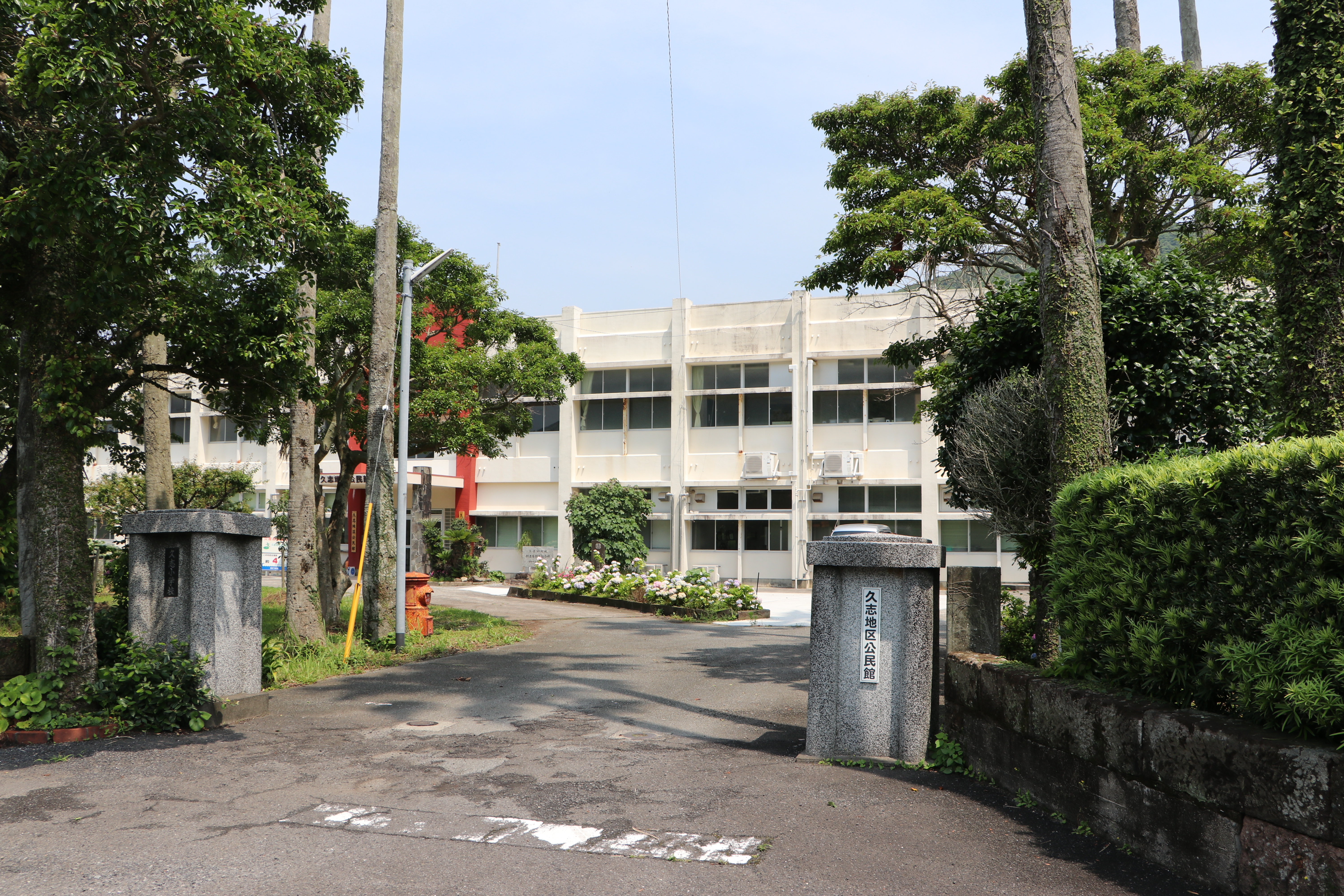 南さつま市立久志小学校（2010年閉校）の校門。現在は久志地区公民館と南さつま市役所坊津支所久志出張所となっている。 Canon EOS 80D